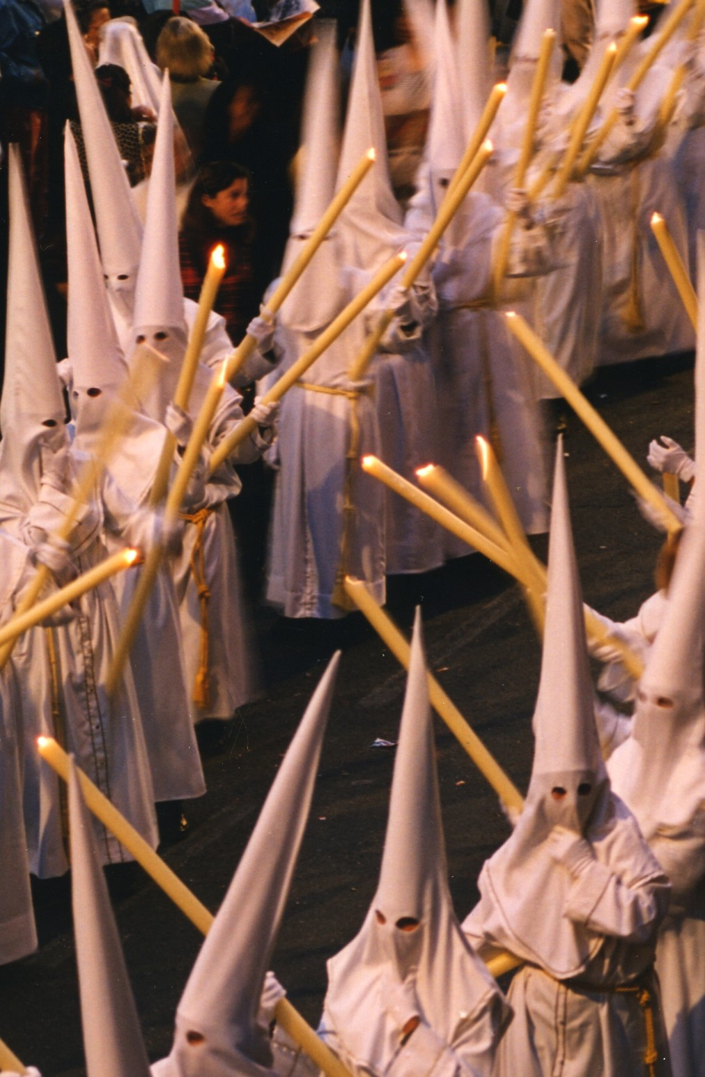 Nazarenos en la Semana Santa malagueña.